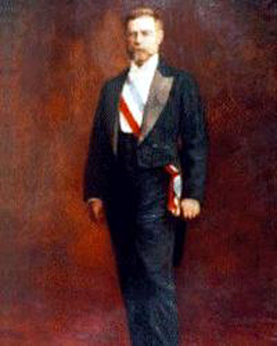 President German Riesco